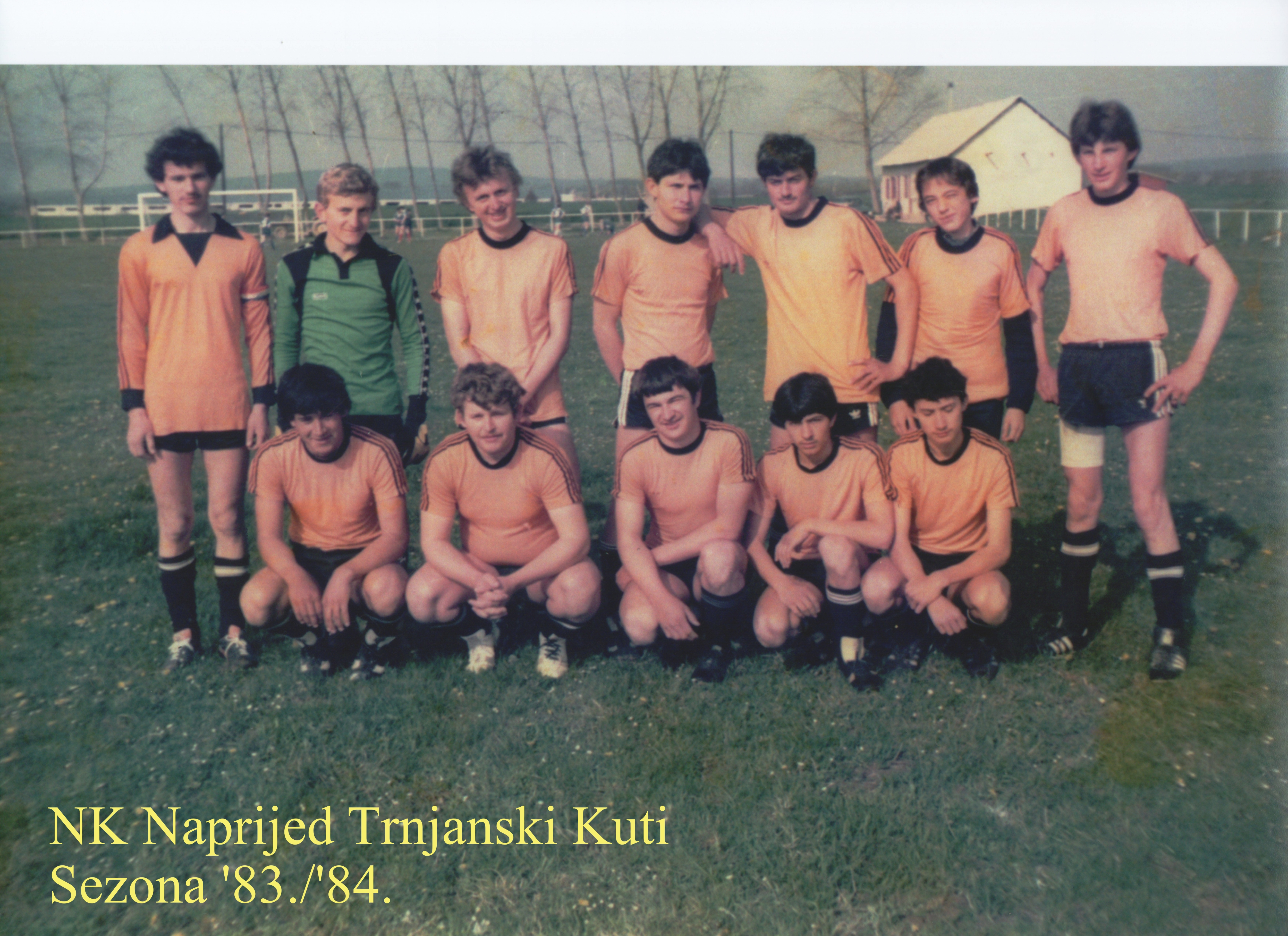 Juniori NK Naprijed sezona 1983./84. godine